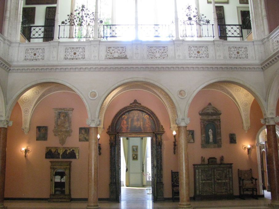 Patio. Villa Ephrussi de Rothschild (Patio)